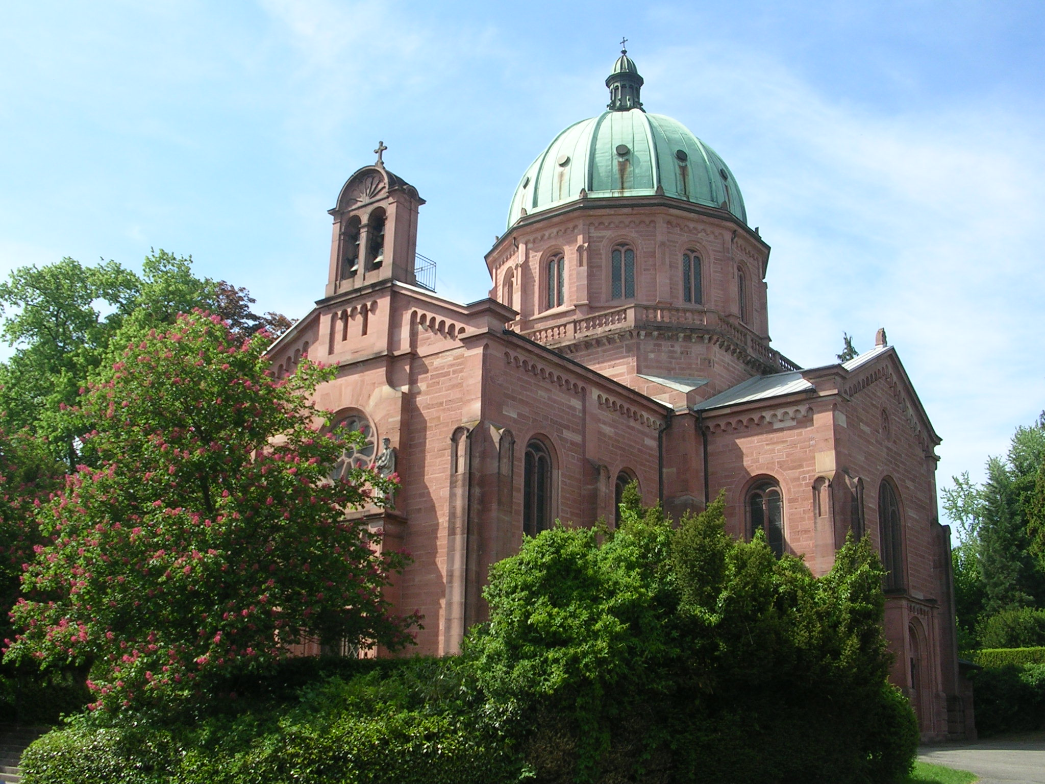 Christuskirche